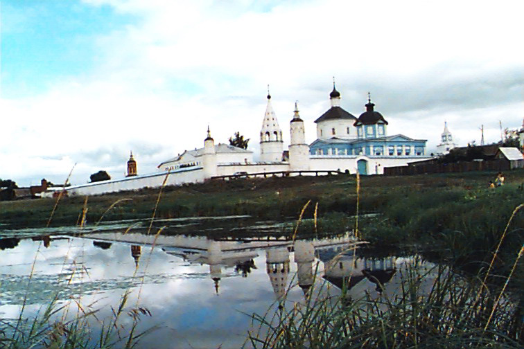 Бобренев монастырь в Коломенском районе